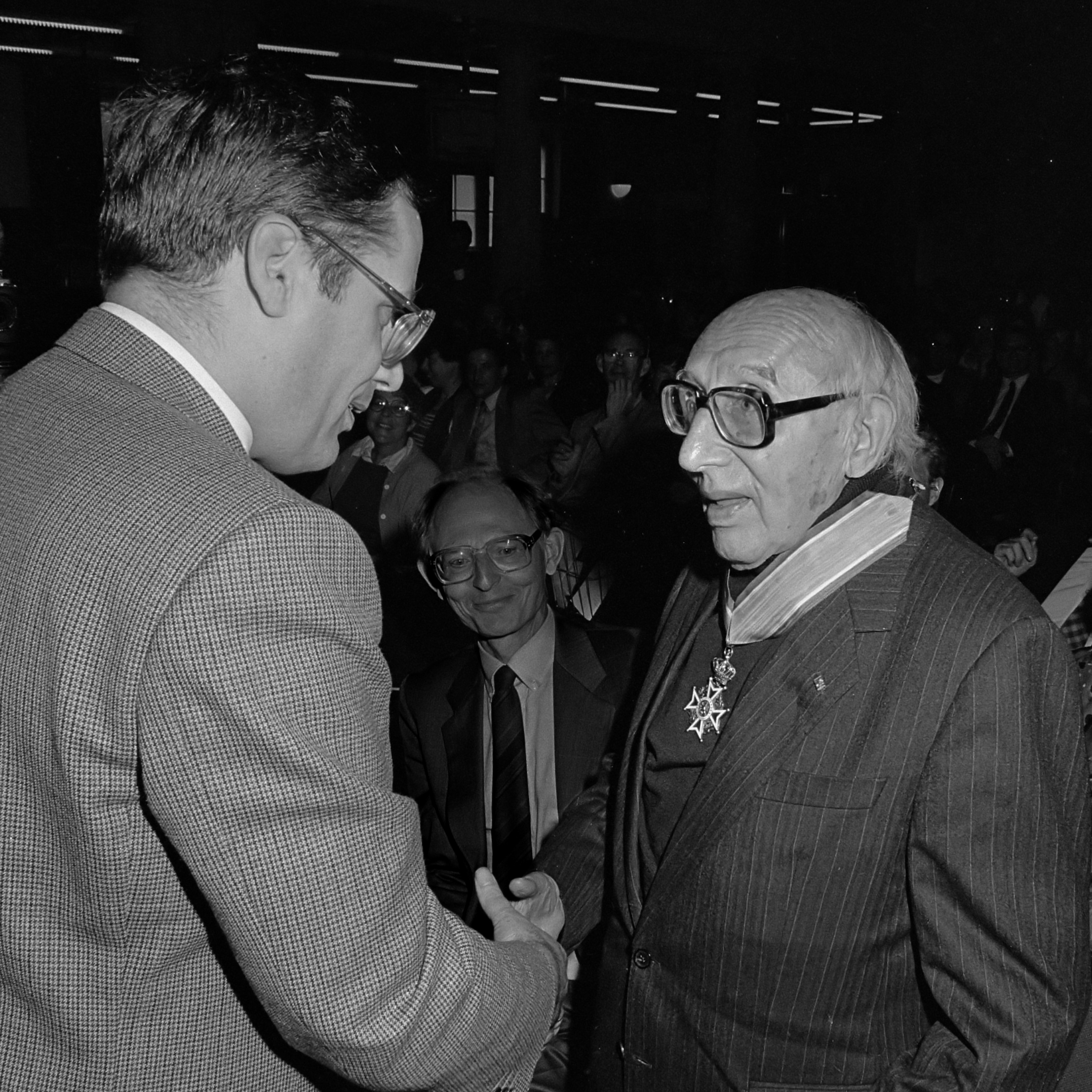 Socioloog Norbert Elias onderscheiden door minister Deetman (Amsterdam); Norbert Elias (90 jaar) 22 juni 1987